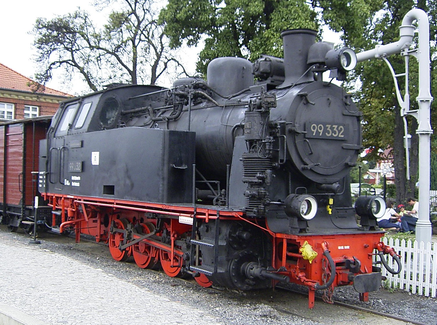 Dampflokomotive der Baureihe 99 der Deutsche Reichsbahn im Bahnhof Kühlungsborn West.